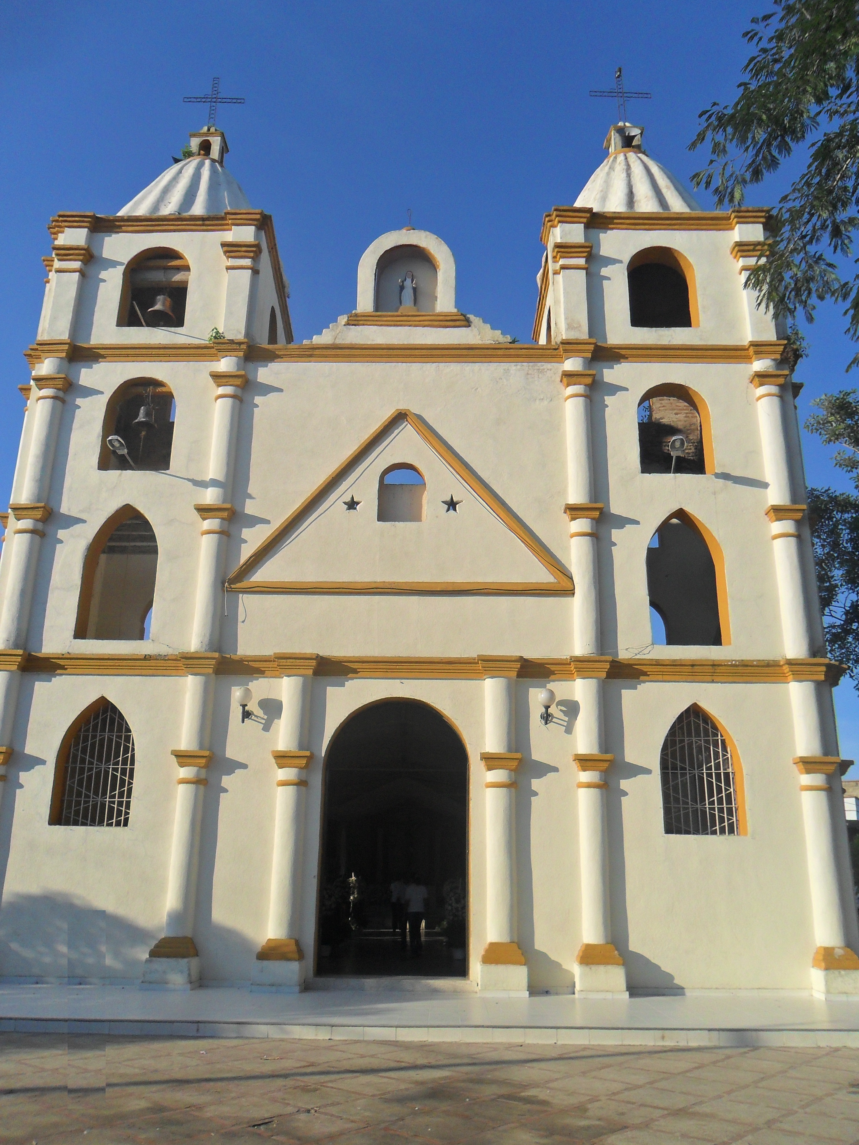 Templo Parroquial Santa Rosa de Lima de Los Palmitos - Sucre